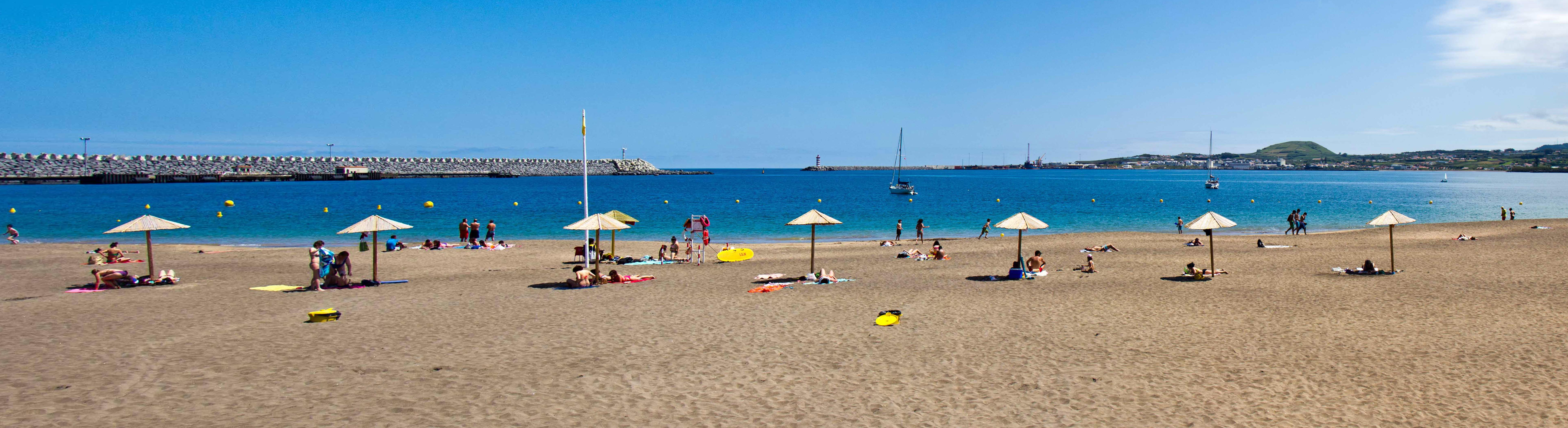 Prainha panorama